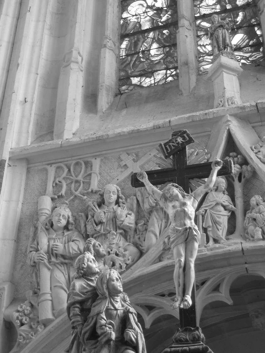 Folleville (Somme, France)